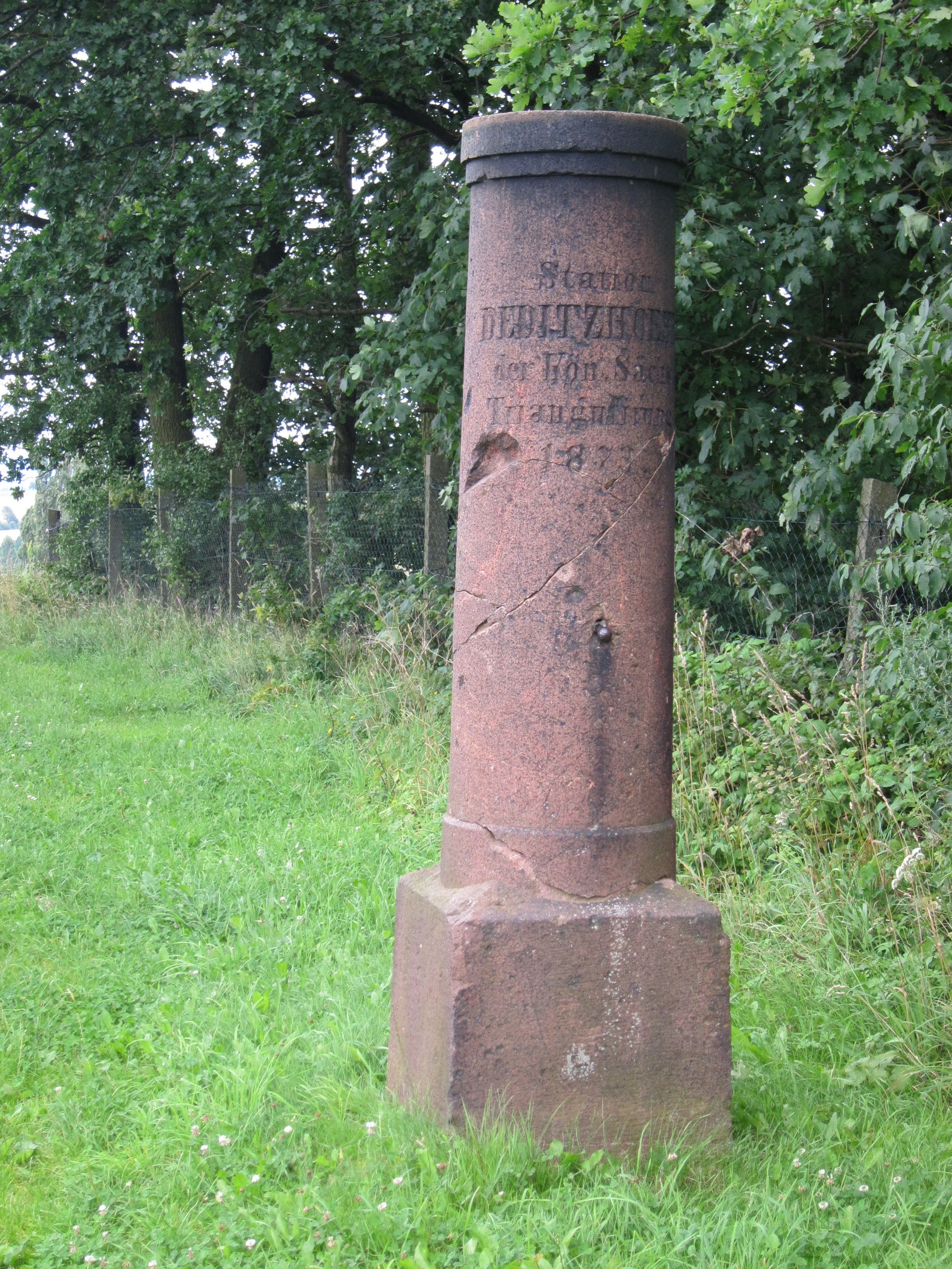 Trigonometrischer Punkt 2. Ordnung Nr. 107 der Königlich-Sächsischen Triangulierung